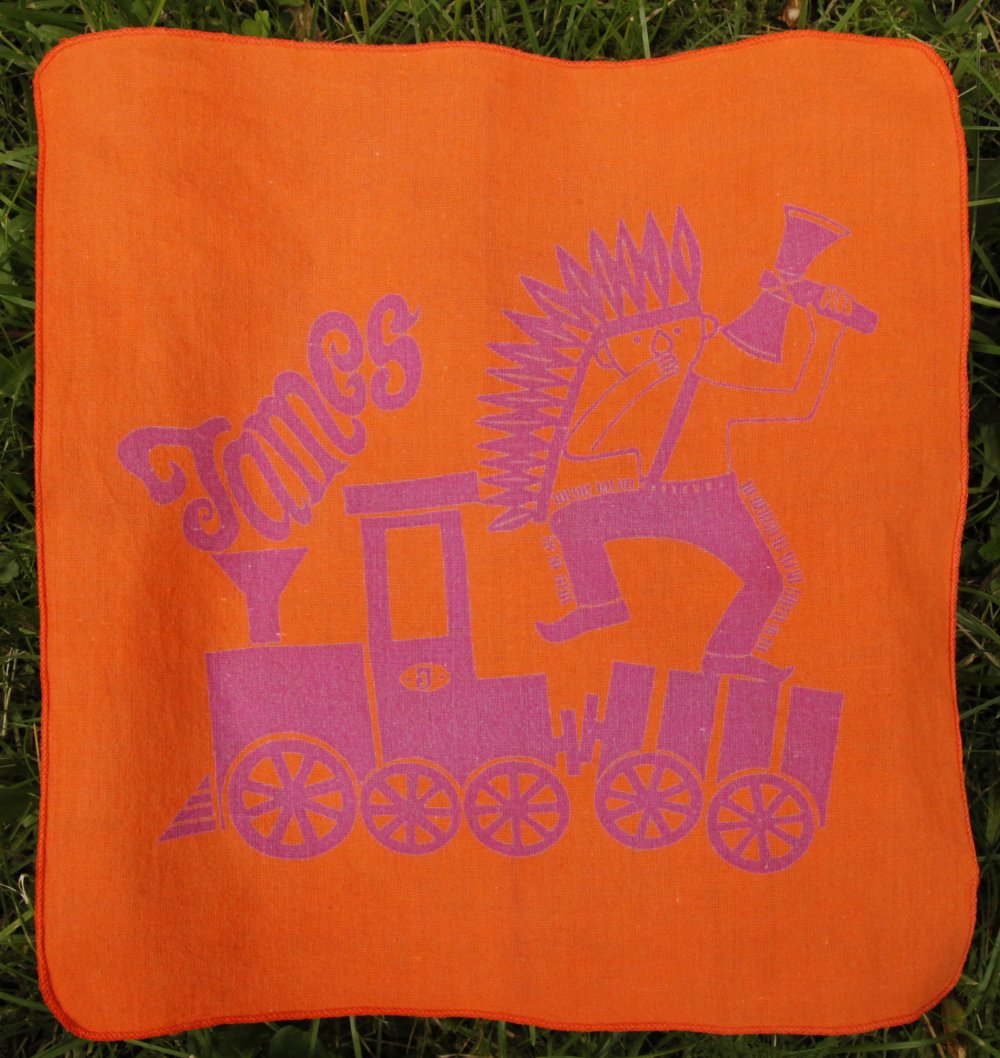 James-liina, joita käytettiin James-farkkujen markkinoinnissa Suomessa 1960-luvulla.